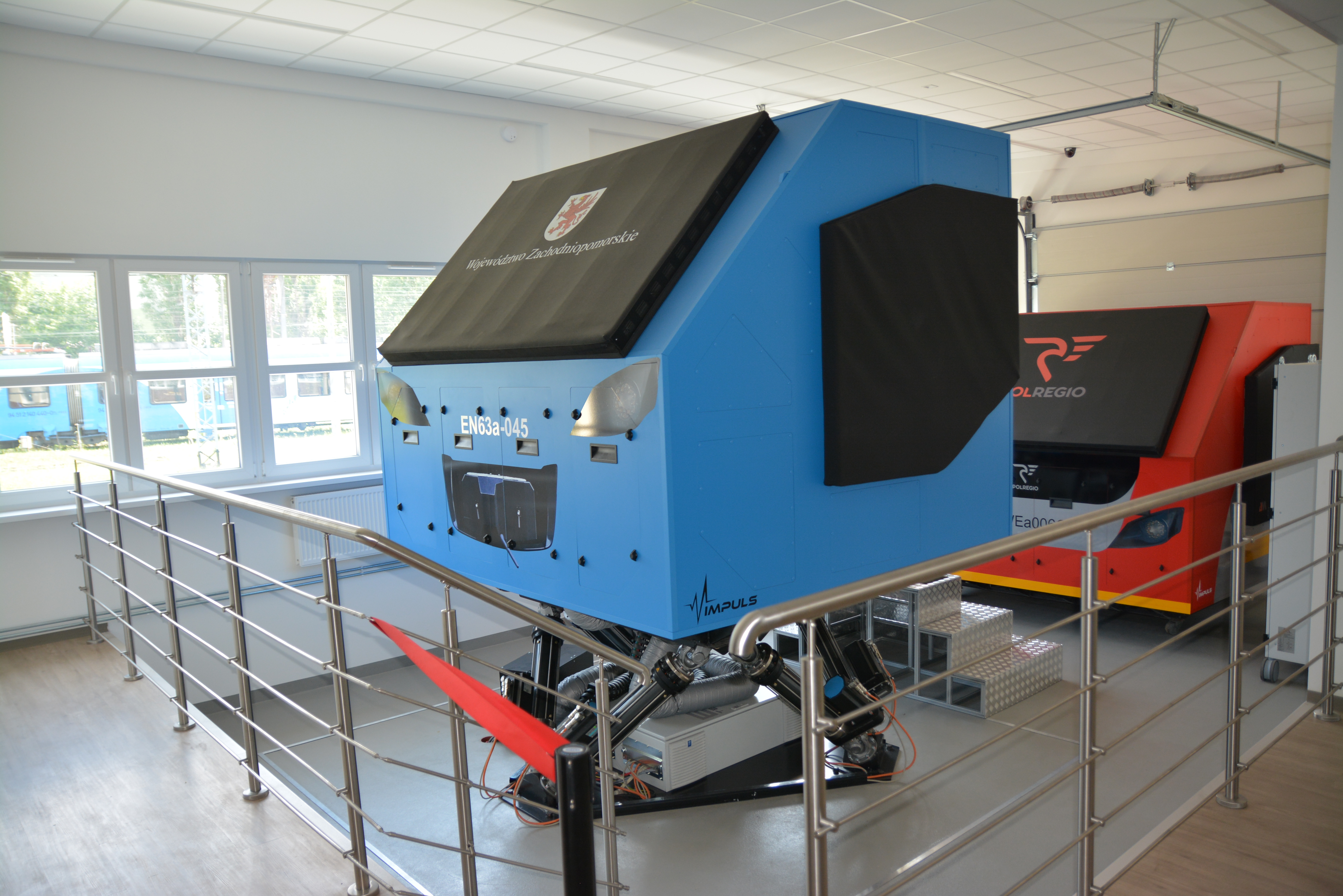 Symulator kierowania pociągiem w Centrum Szkolenia Maszynistów - Szczecin Wzgórze Hetmańskie